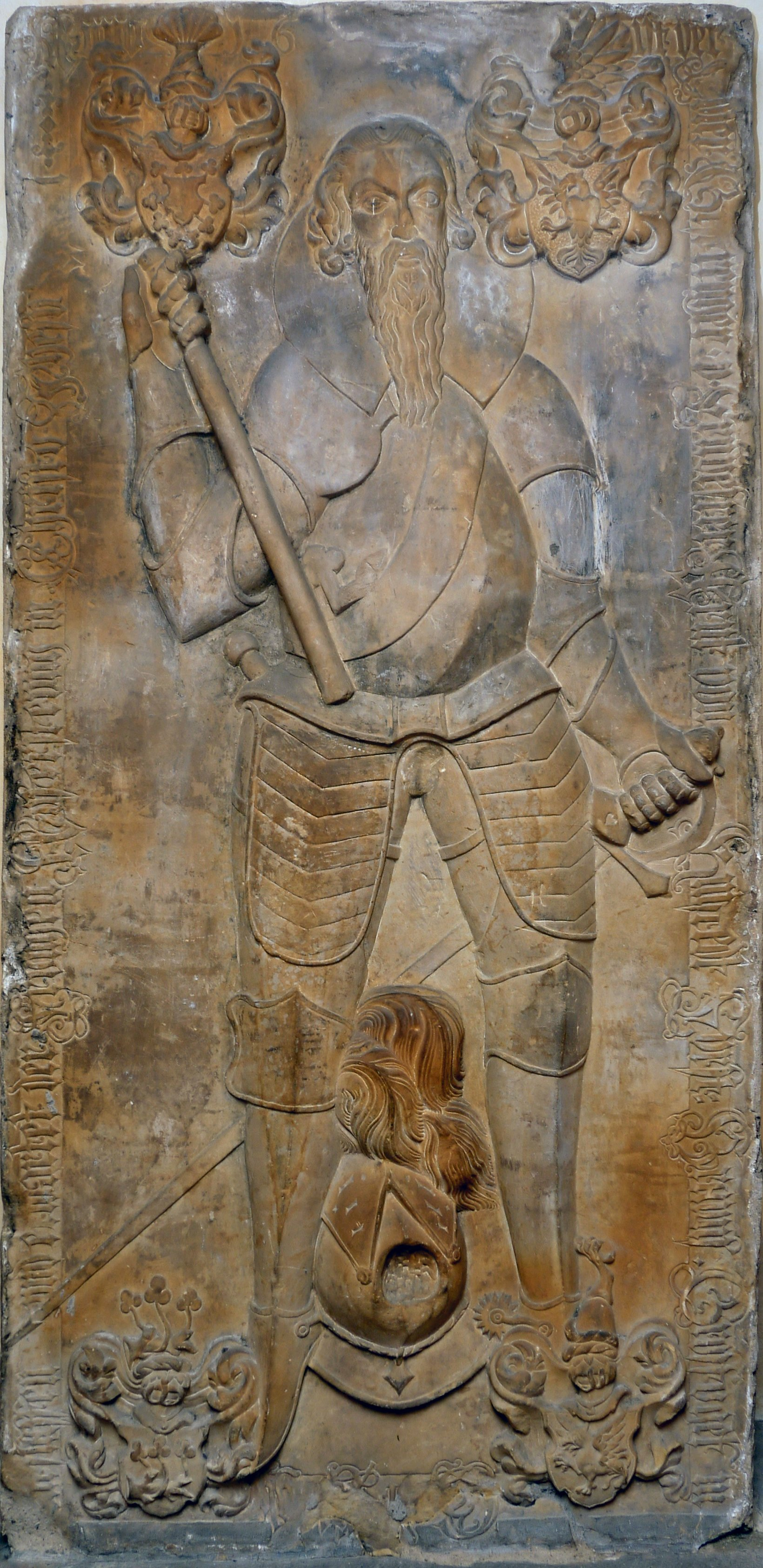 Kniestedter Kirche in Salzgitter-Bad: Grabplatte mit dem Bildnis eines Geharnischten (im Turm neben dem Eingang), des herzoglich braunschweigischen Großvogts Arndt von Kniestedt (gestorben 11. Oktober 1611) zu Wolfenbüttel. Umschrift Kopfleiste: „Anno (= im Jahre) 16 (Rest unlesbar; stand wohl ehemals 1611) [...] ist der“/ Umschrift rechte Seite: „Edler Gestrenger · u · (= und) Ernvester (= ehrenfester) Arnt von Knistedt Fürst:(lich) Brauns.(chweigischer) Grosfoget (= Großvogt) in“/ Umschrift Unterleiste: (ehemals lesbar? Wolfenbüttel ??)/ Umschrift linke Seite: „Gestaffen (? Anfang fast nicht mehr lesbar; = Gestorben?) und erwartet der Frouhen (= frohen) Aufersteung (= Auferstehung) in Christu Jhesu“